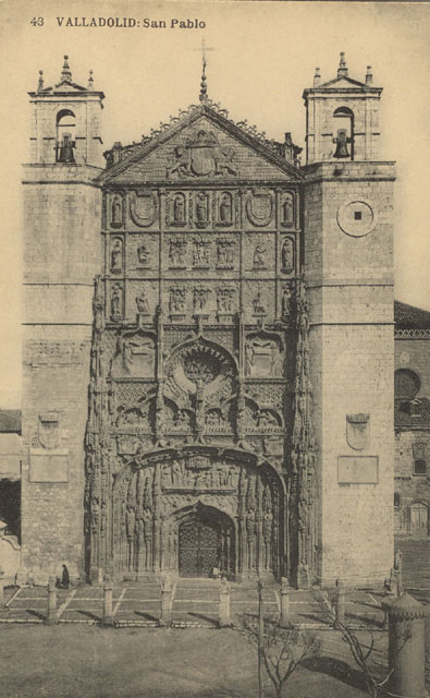 Iglesia de San Pablo - Valladolid - L. J. Valladolid. Fototipia Hauser y Menet. Madrid - Tarjeta postal 140 x 90 B/N